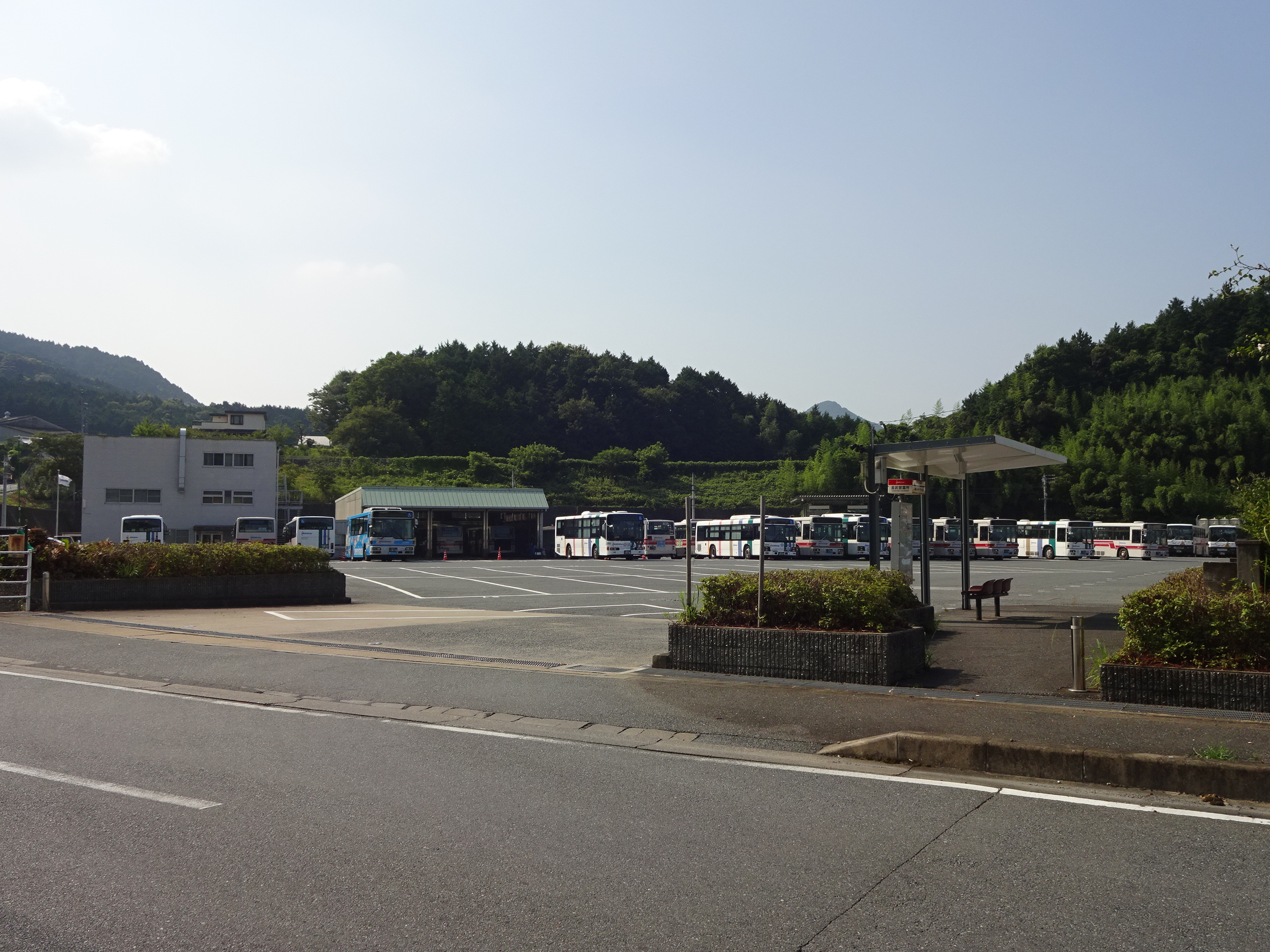 西日本鉄道金武自動車営業所 2015.08.15撮影